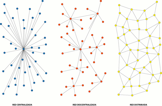 Paul Baran Net Ghrapics